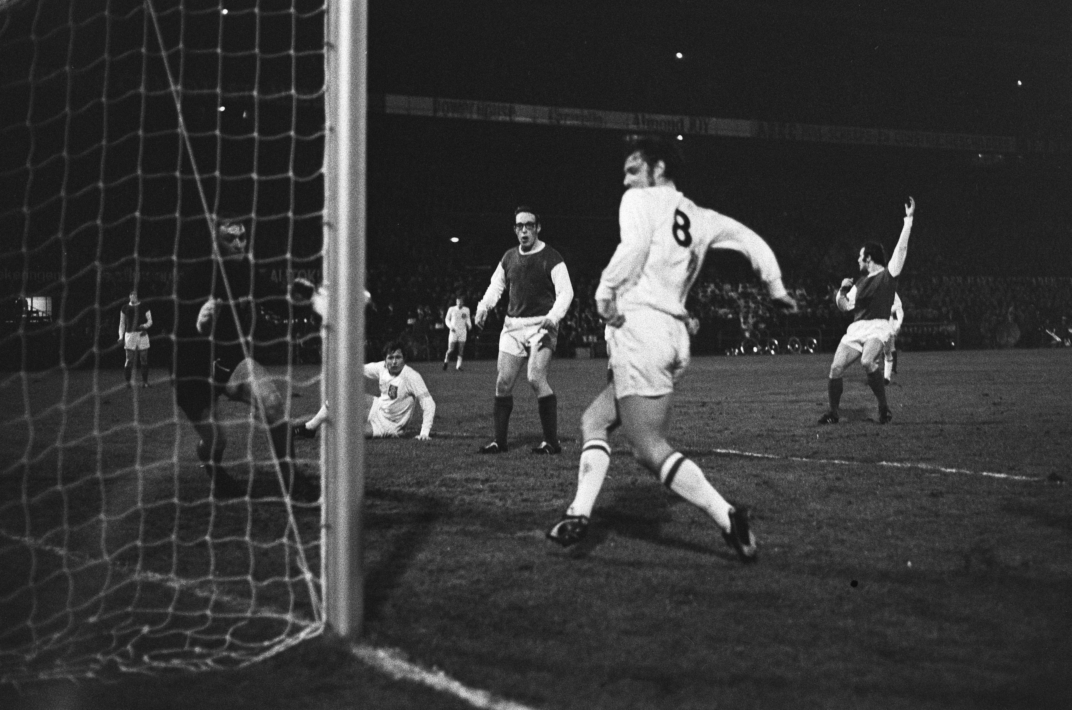 Collectie / Archief : Fotocollectie Anefo Reportage / Serie : [ onbekend ] Beschrijving : Nederland tegen Luxemburg 6-0; Lippens scoort eerste doelpunt Datum : 24 februari 1971 Trefwoorden : doelpunten, sport, voetbal Fotograaf : Verhoeff, Bert / Anefo Auteursrechthebbende : Nationaal Archief Materiaalsoort : Negatief (zwart/wit) Nummer archiefinventaris : bekijk toegang 2.24.01.05 Bestanddeelnummer : 924-3001